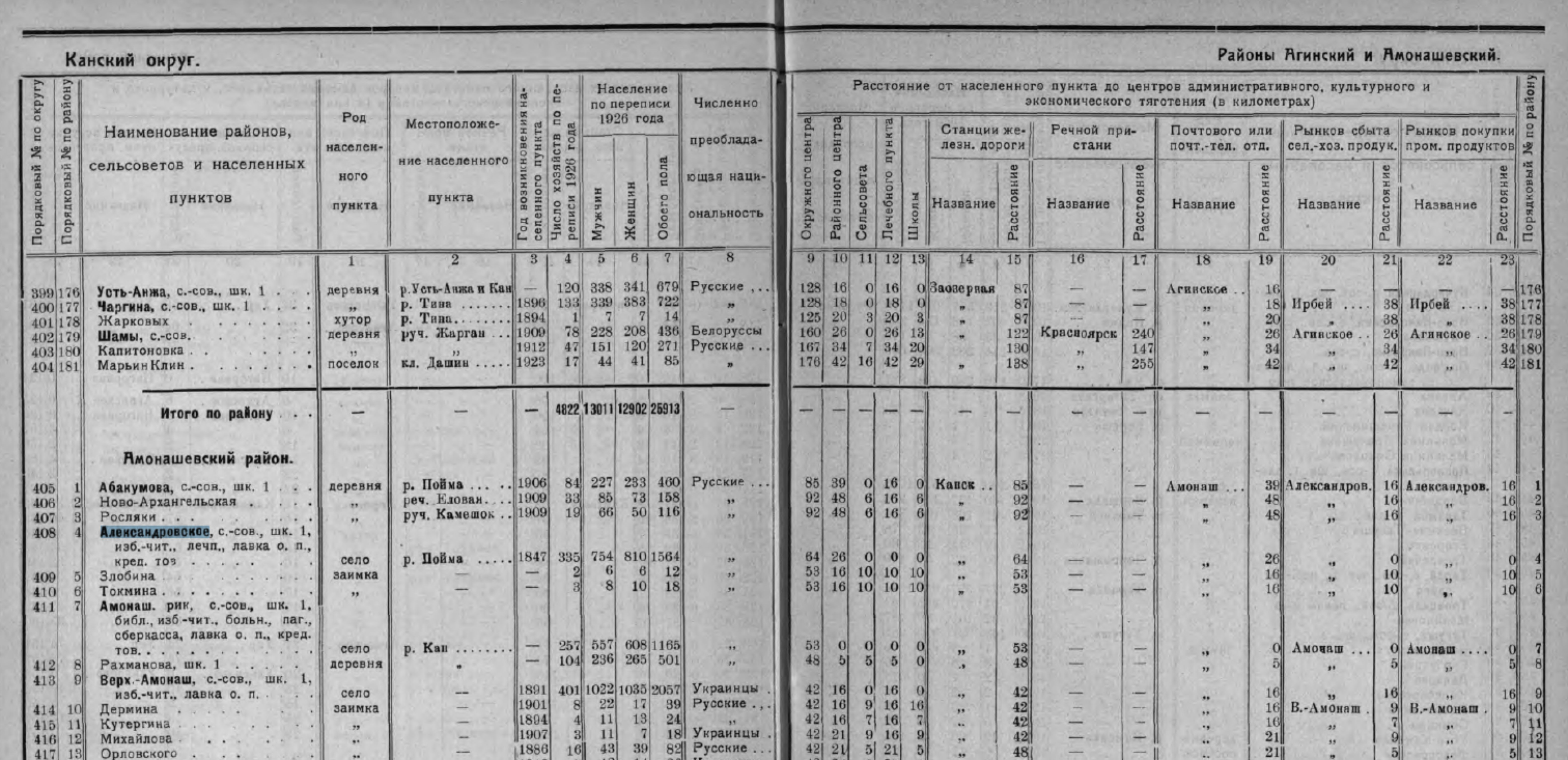 СПИСОК НАСЕЛЕННЫХ МЕСТ Сибирского края 1929 с. Александровское